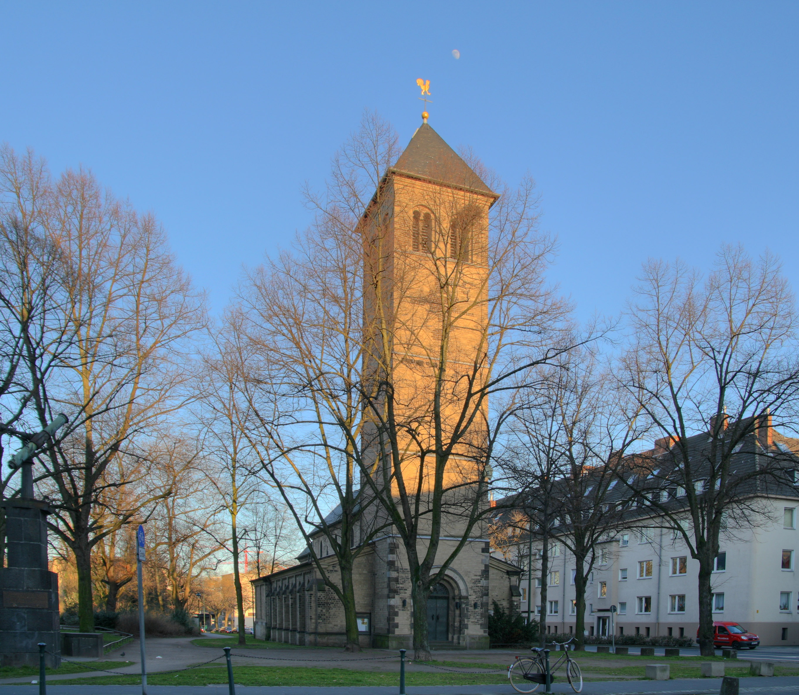 "Alt St. Martin" church in Düsseldorf, Germany